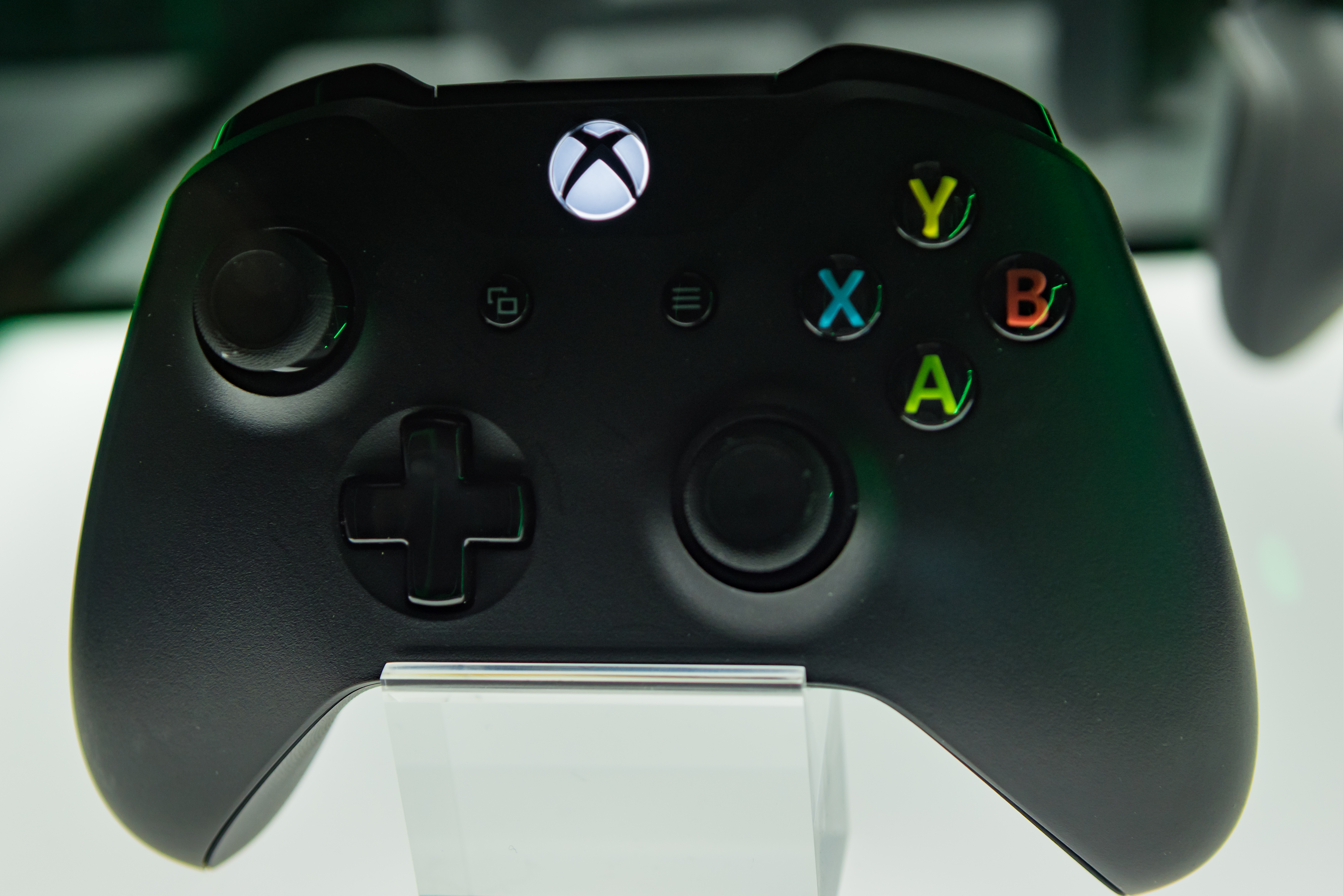 XBOX ONE X Controller Gamescom